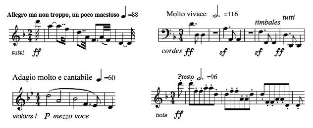 Beethoven, 9e symphonie, ré mineur